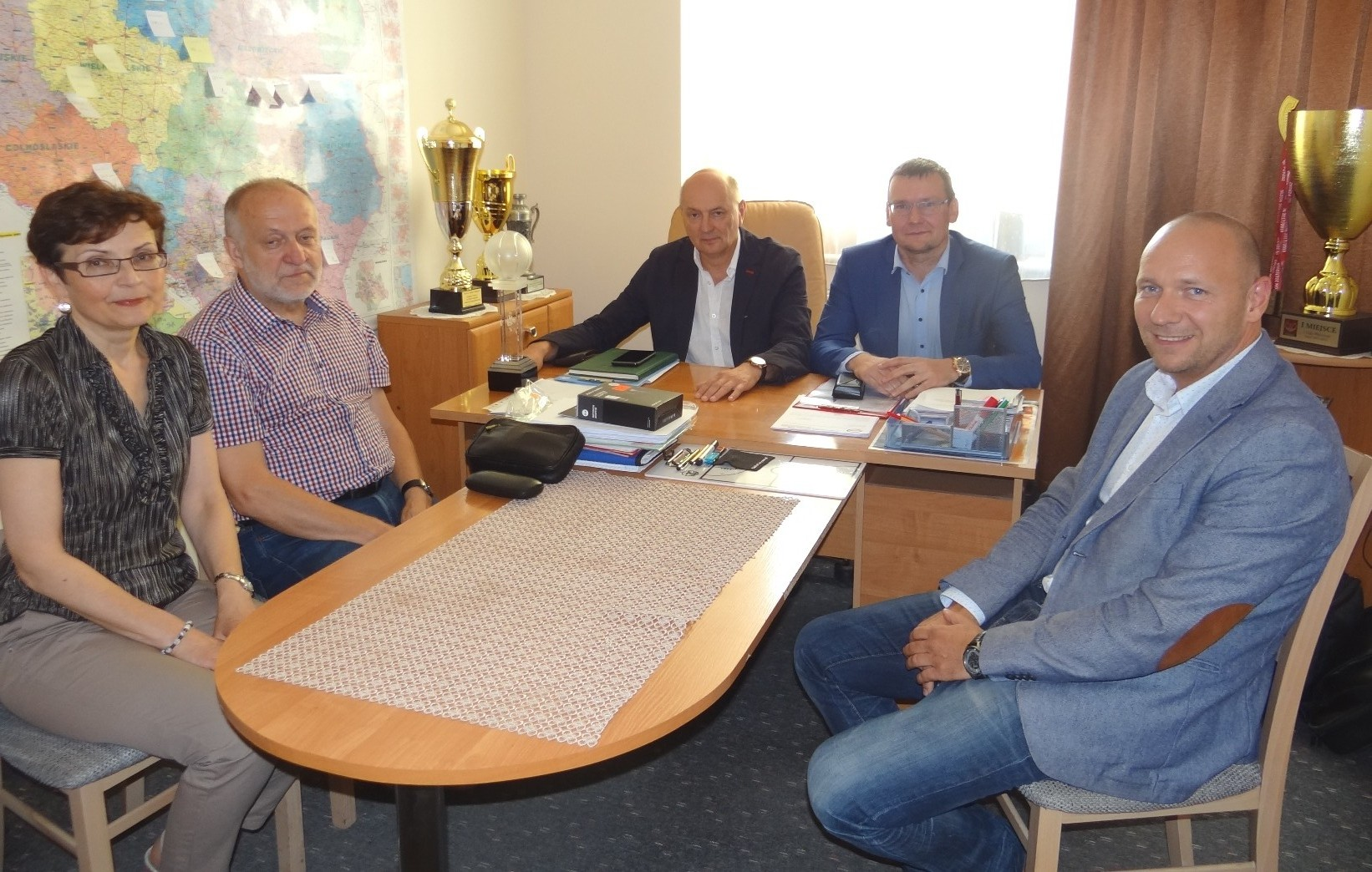 Rada Nadzorcza Spółki Akcyjnej Spójnia Stargard